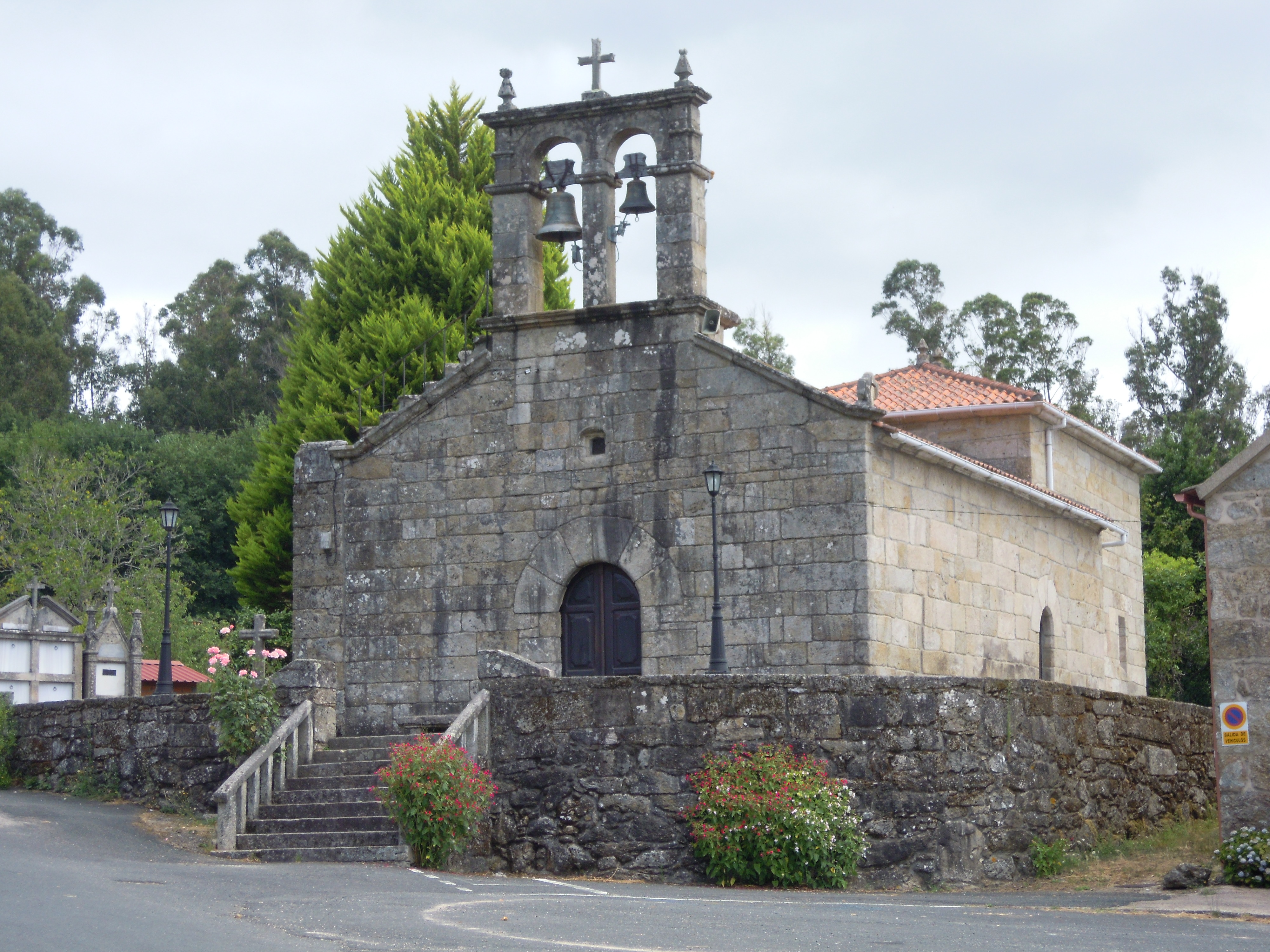 Igrexa parroquial de Santa María de Luneda (A Cañiza)